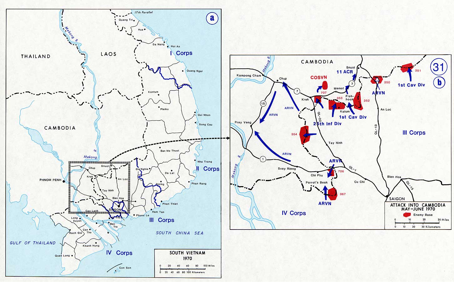 Cambodian Campaign 1970